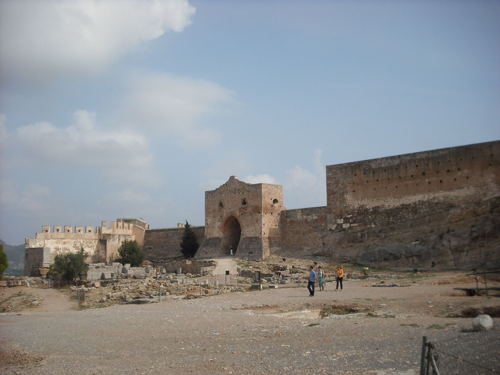 Plaça d'armes i porta d'Almenara al castell de Sagunt. A mà dreta, les restes del fòrum romà.